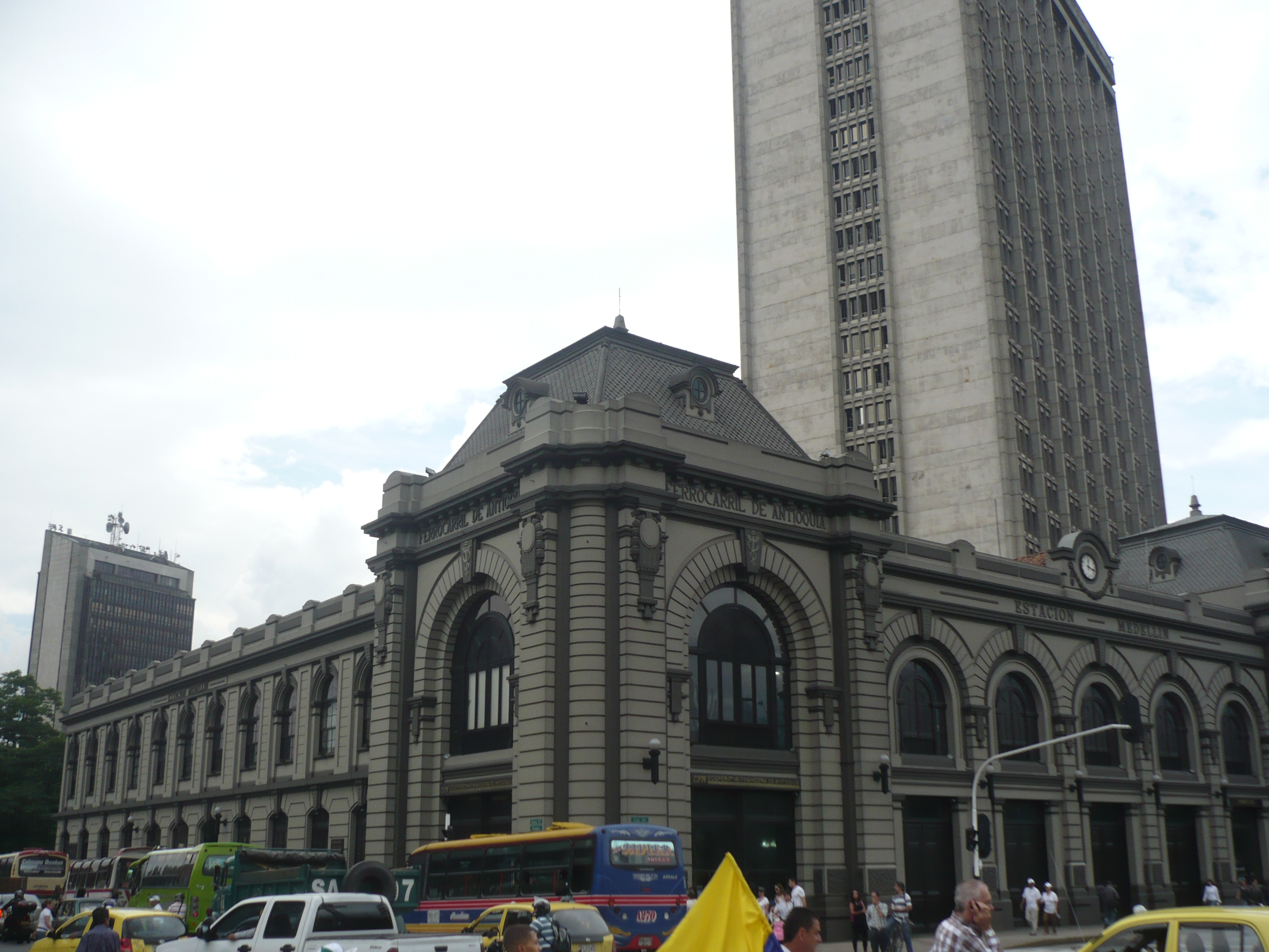 Medellin - Estación del Ferrocarril de Antioquia